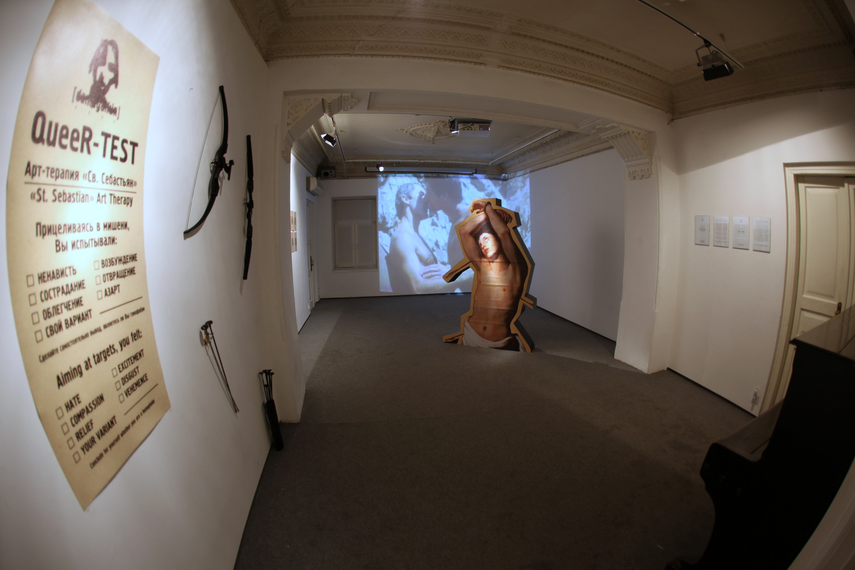 Даніїл Галкін "Queer Time", 2012